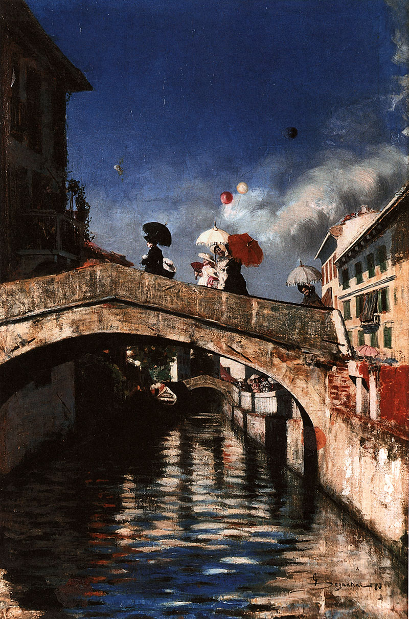 GIOVANNI SEGANTINI, Il Naviglio a Ponte San Marco, 1880 olio su tela, 76 x 52,5 cm Collezione privata